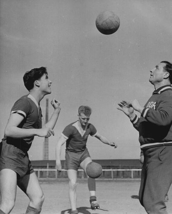 Zentralbild-Kohls-Leske Tre. Fußball-Juniorenmannschaft der DDR spielt in Ungarn - Die Trainingsvorbereitungen unserer Junioren in Kienbaum bei Berlin wurden am 12.4.1961 abgeschlossen. Am Sonntag treffen sie auf die Junioren-Auswahl der Volksrepublik Ungarn. UBz.: Trainer Schwenzfeier (rechts) beim Kopfballspiel mit Berndt Leopold im Trainingslager Kienbaum. Im Hintergrund Peter Hentschel.